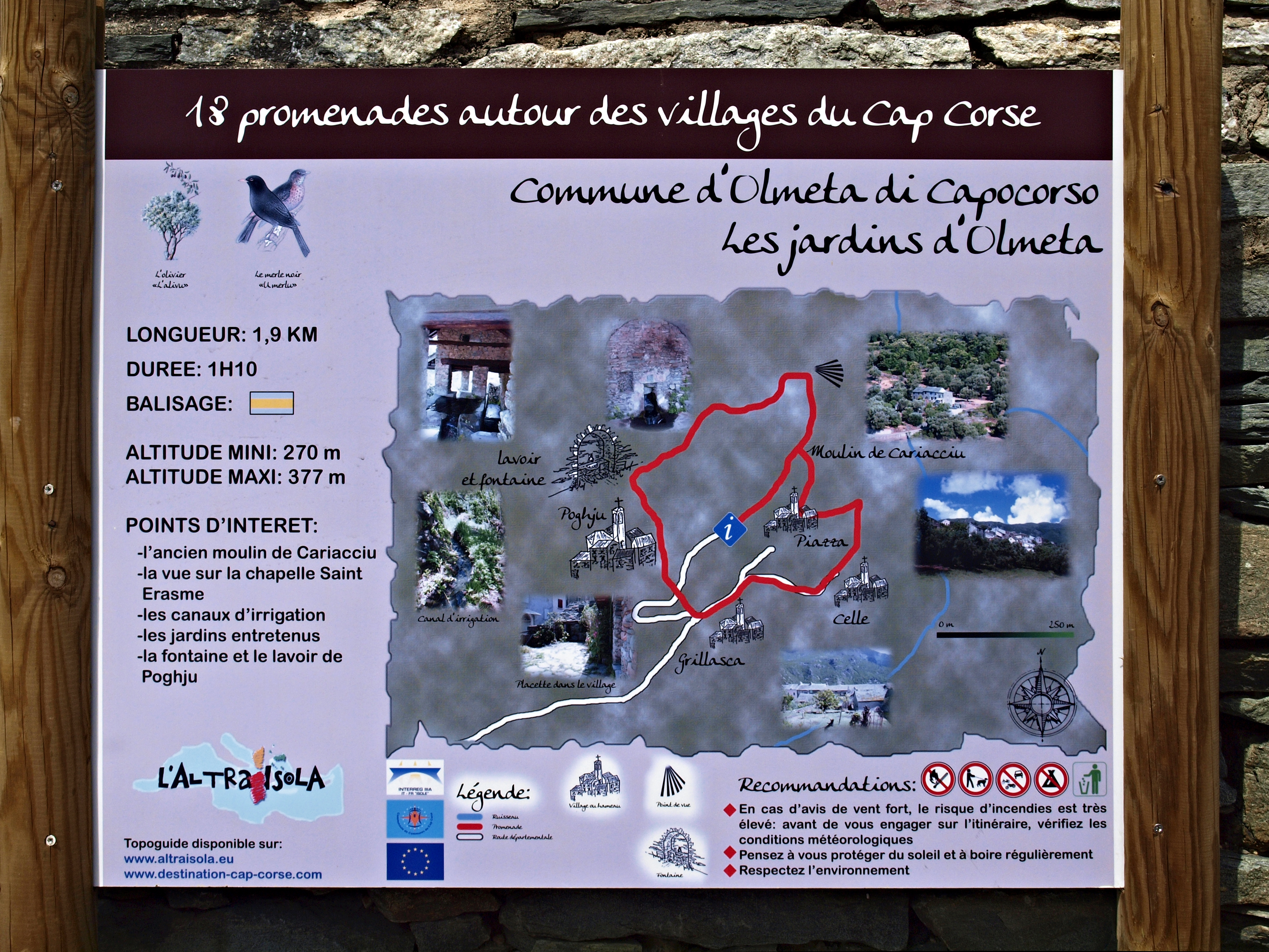 Olmeta-di-Capocorso (Corsica) - Panneau Promenade